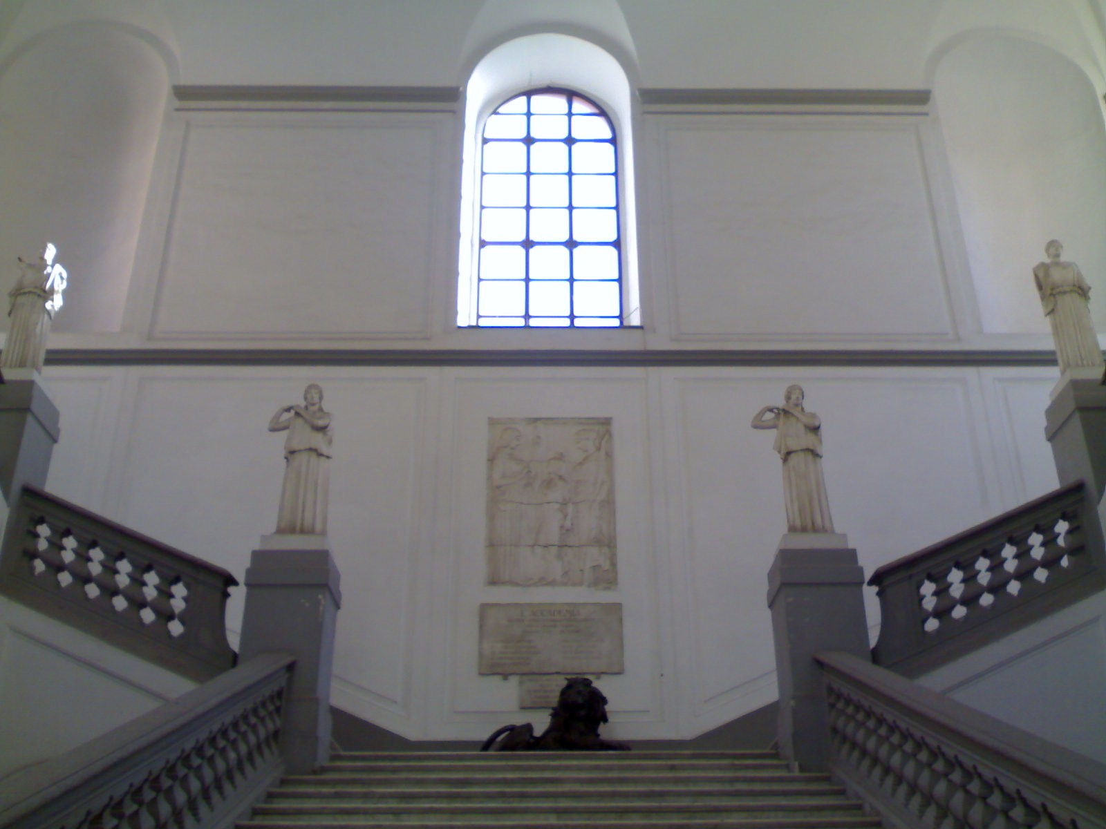 Interno del Palazzo delle Bellearti (Napoli)s